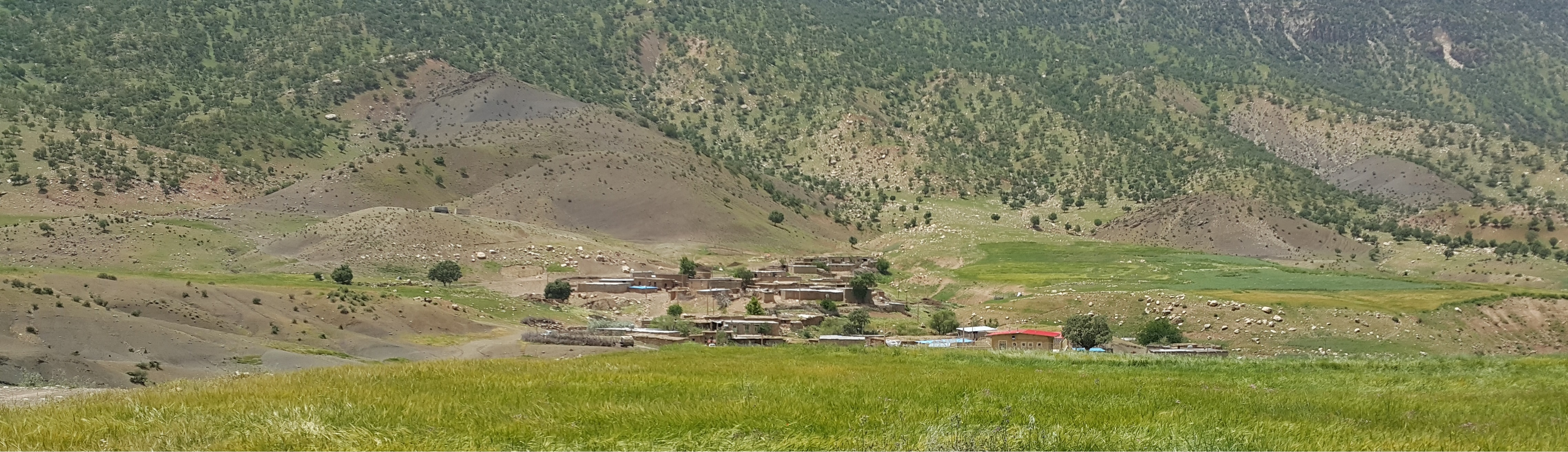 عکس سراسرنما از سرفراش - اردیبهشت 1395